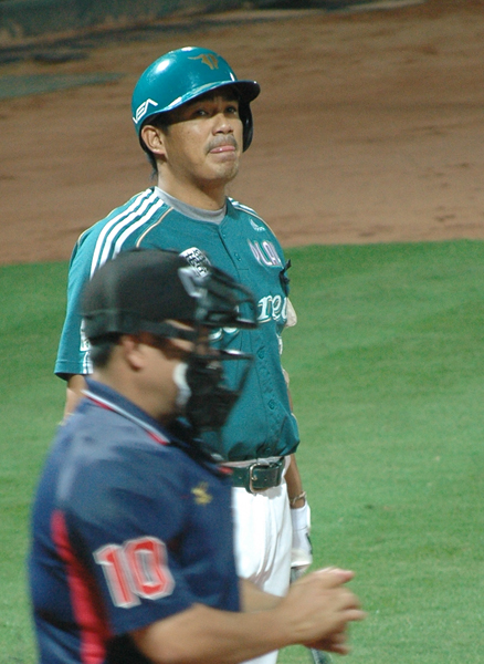 陳金鋒與中華職棒裁判 Bân-lâm-gú: Tân Kim-hong